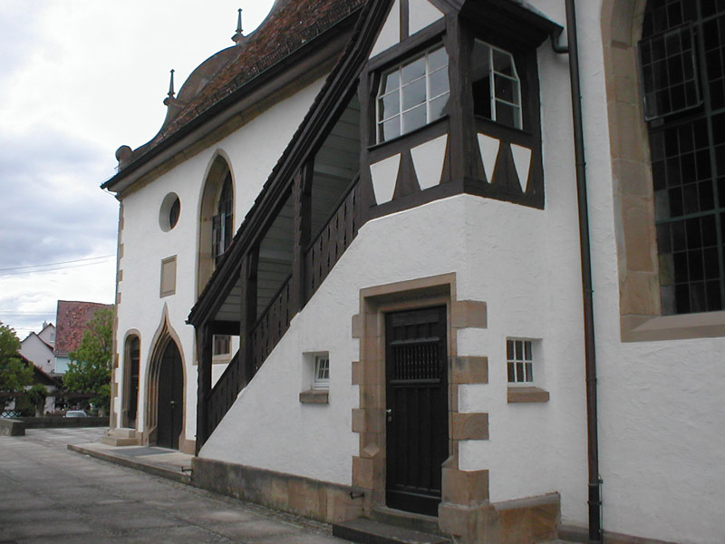 Gedeckter Aufstieg zur Empore der Kirche in Pfaffenhofen (Württ.)